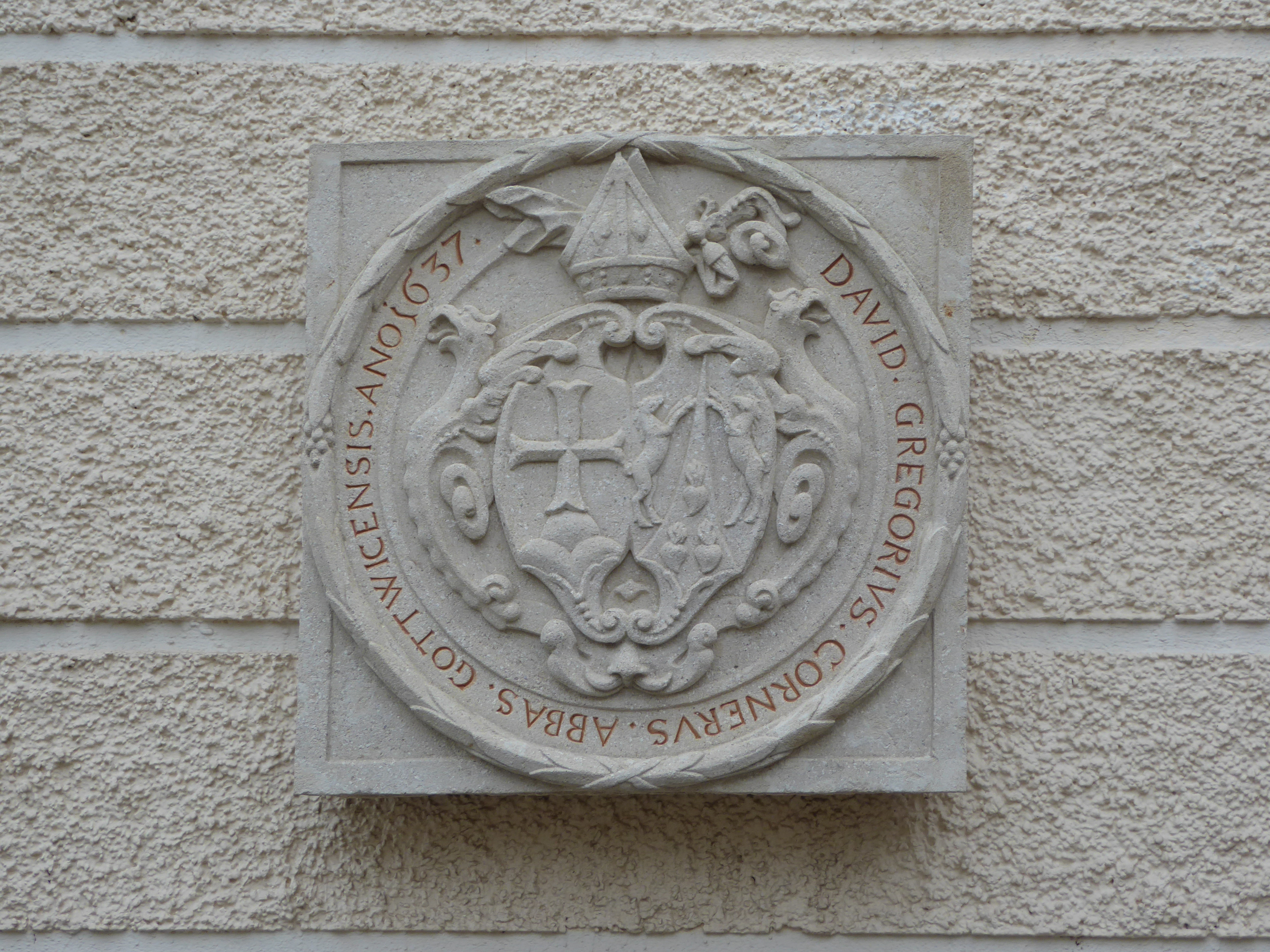 Pfarrhof, Pyhra (bei St. Pölten), Niederösterreich - Relief des Wappens von Abt David Gregor Corner, Stift Göttweig, 1637 (restauriert und an die Pfarrhof-Nordseite versetzt)